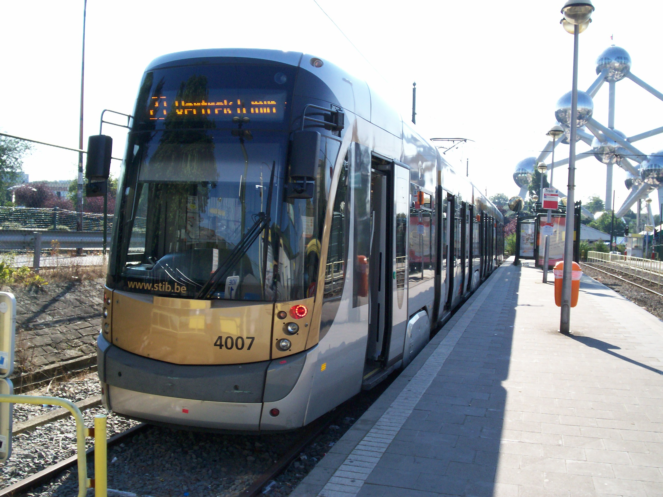 T 4000 de la ligne 23 en station origine de Heysel et en direction de Vanderkindere